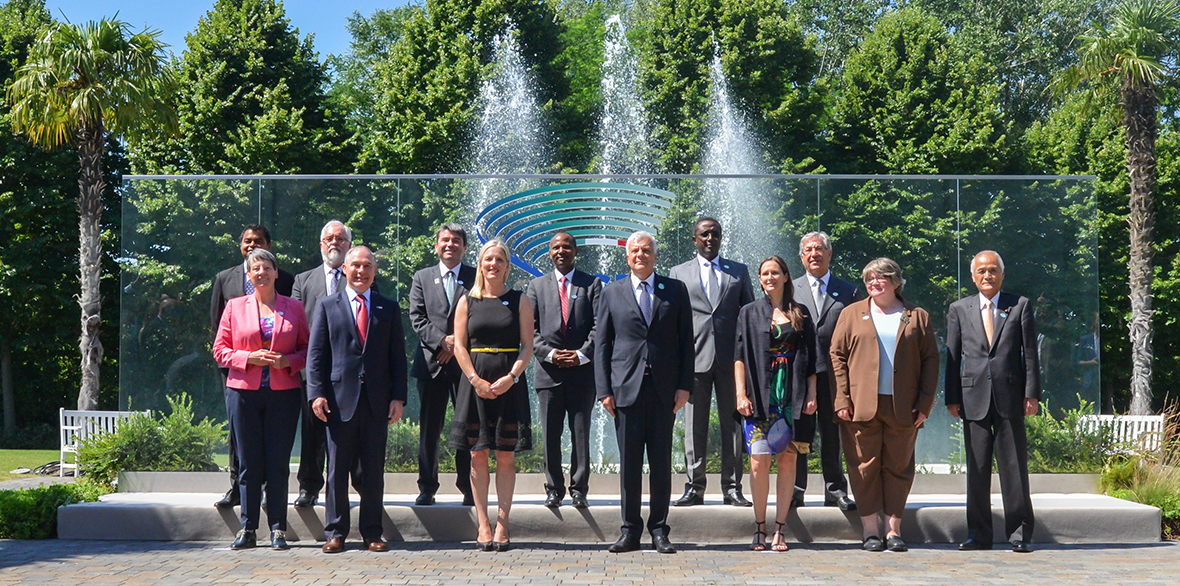 Foto dei partecipanti al G7 Ambiente di Bologna del 2017